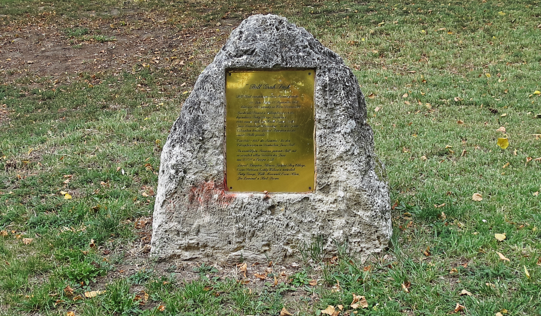 Bill-Grah-Park in Wien-Donaustadt, Gedenkstein für Bill Grah